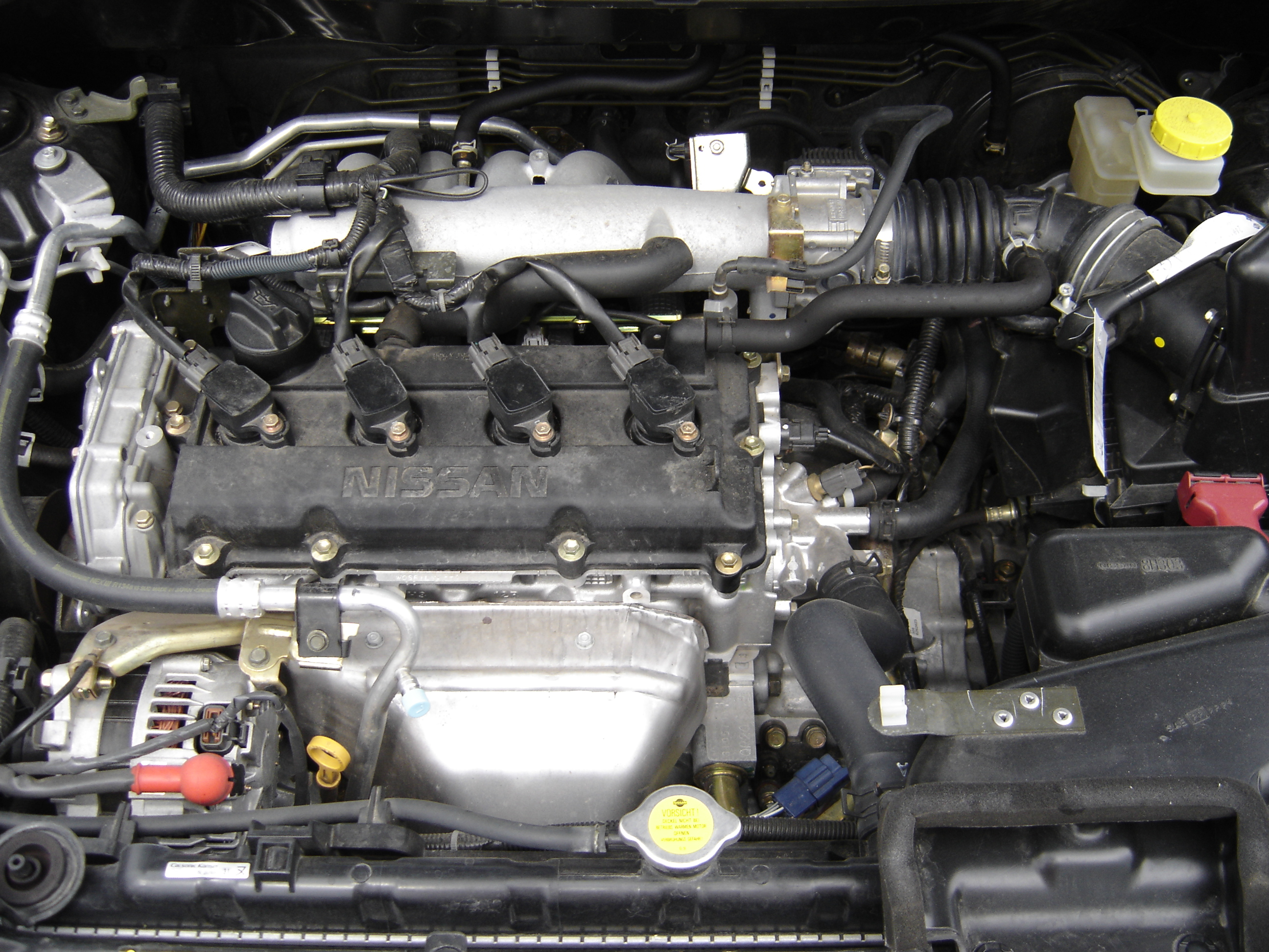 2.0 Liter Benzin-Motor aus dem Nissan X-Trail